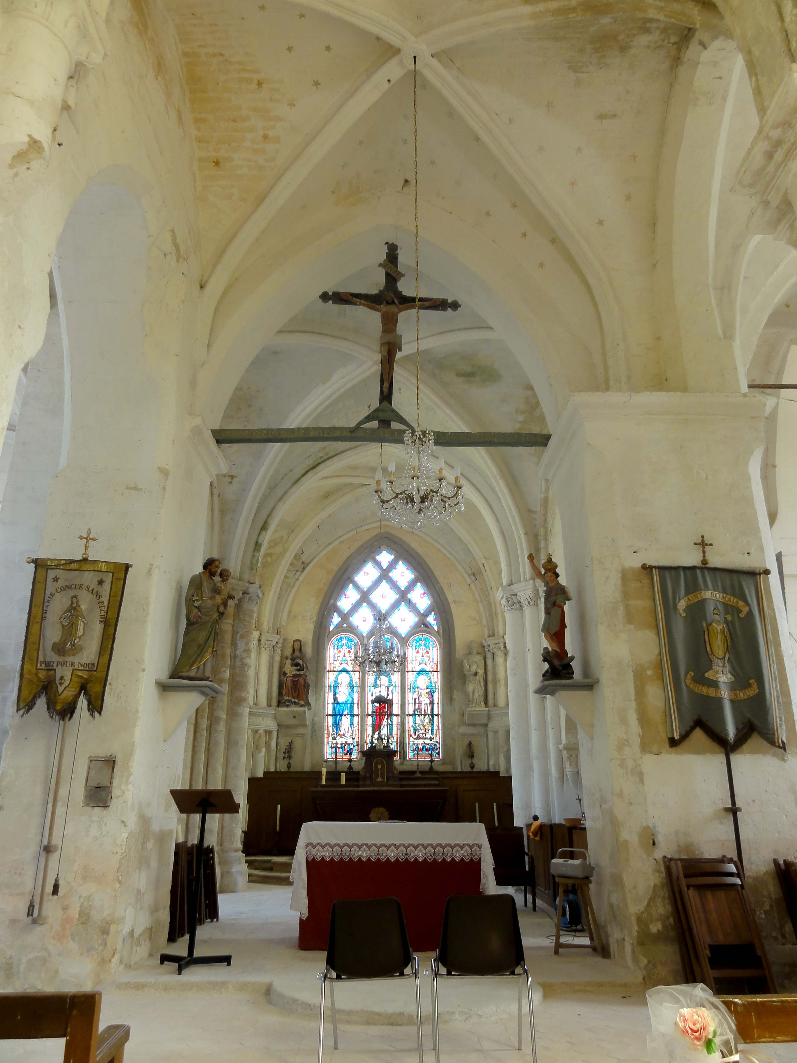 Intérieur de l'église (voir titre).